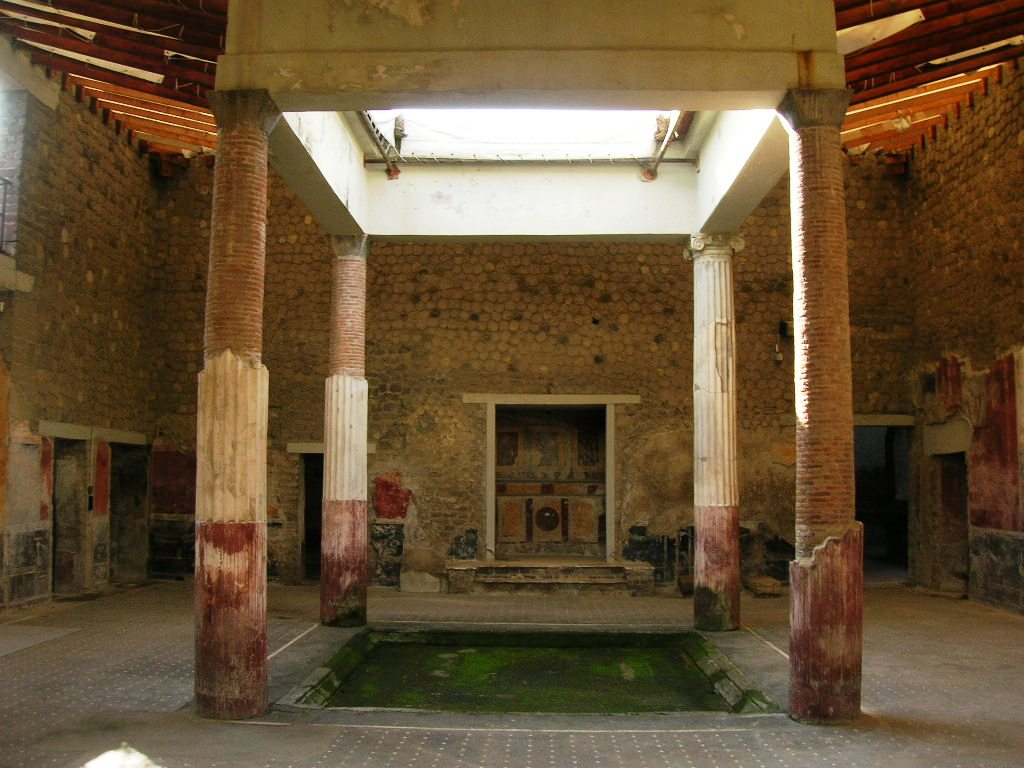 Villa San Marco, villa d'otium di Stabiae, a Castellammare di Stabia